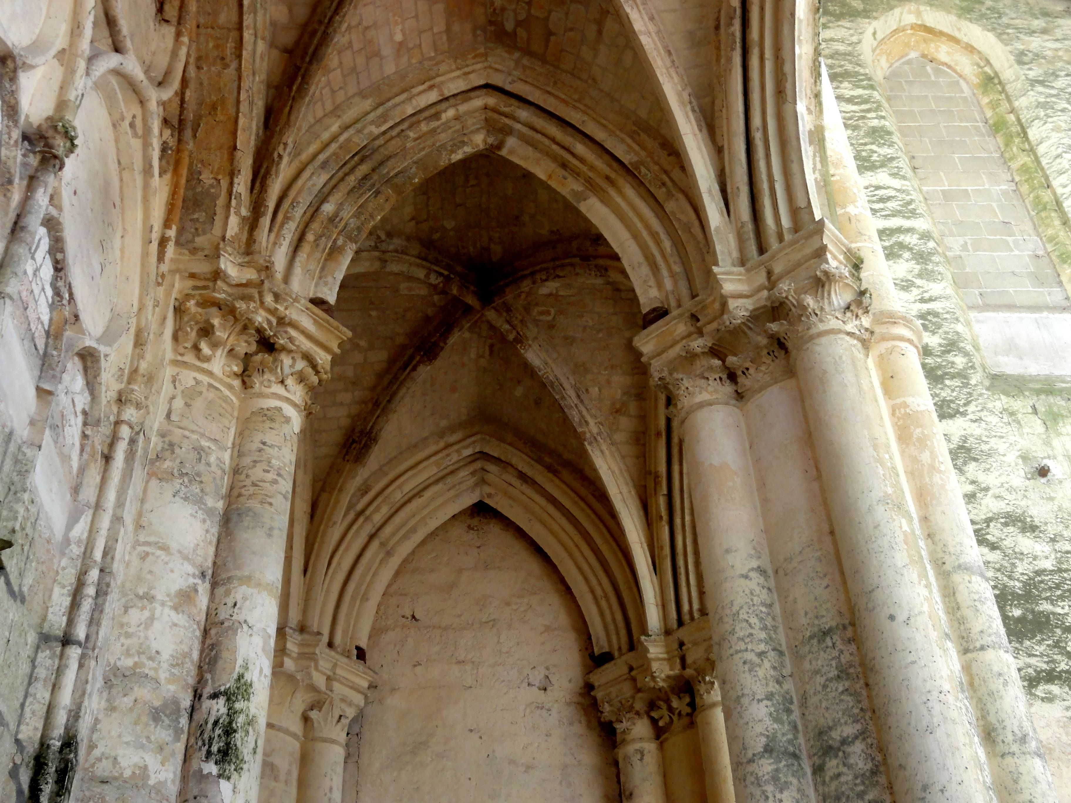 Bas-côté sud, voûte de la première travée.